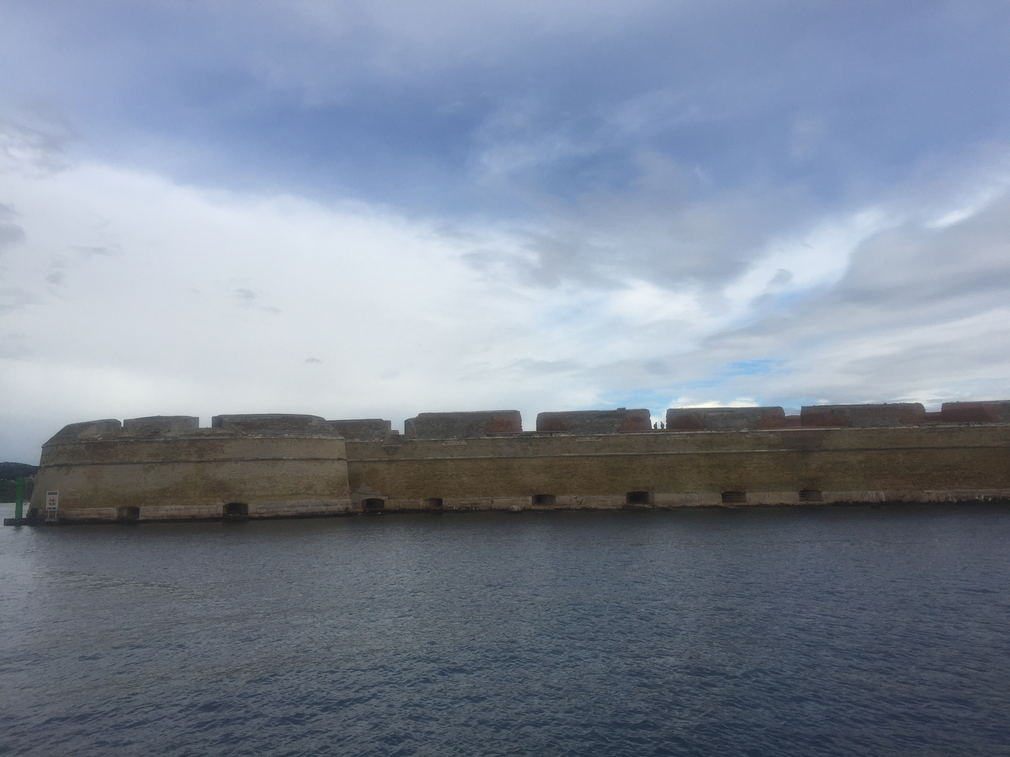 Općina Šibenik, Croatia